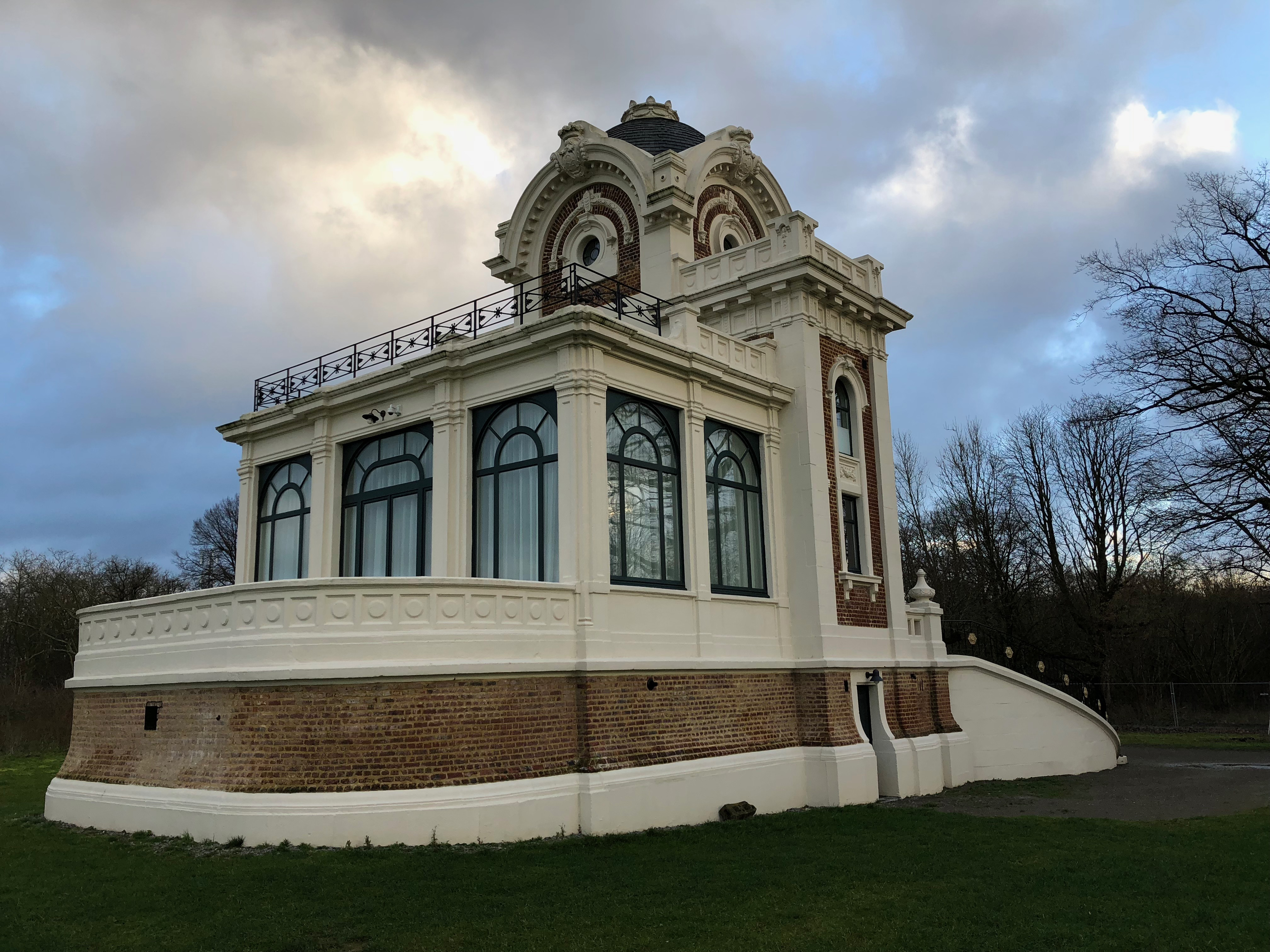 Loge Royale Groenendael